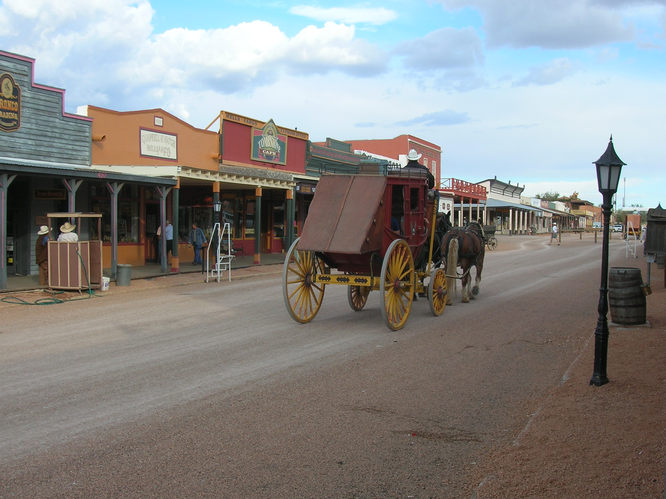 Allen Street, Tombstone, Arizona